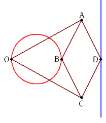 Diagrama geométrico de un mecanismo de Peaucellier-Lipkin